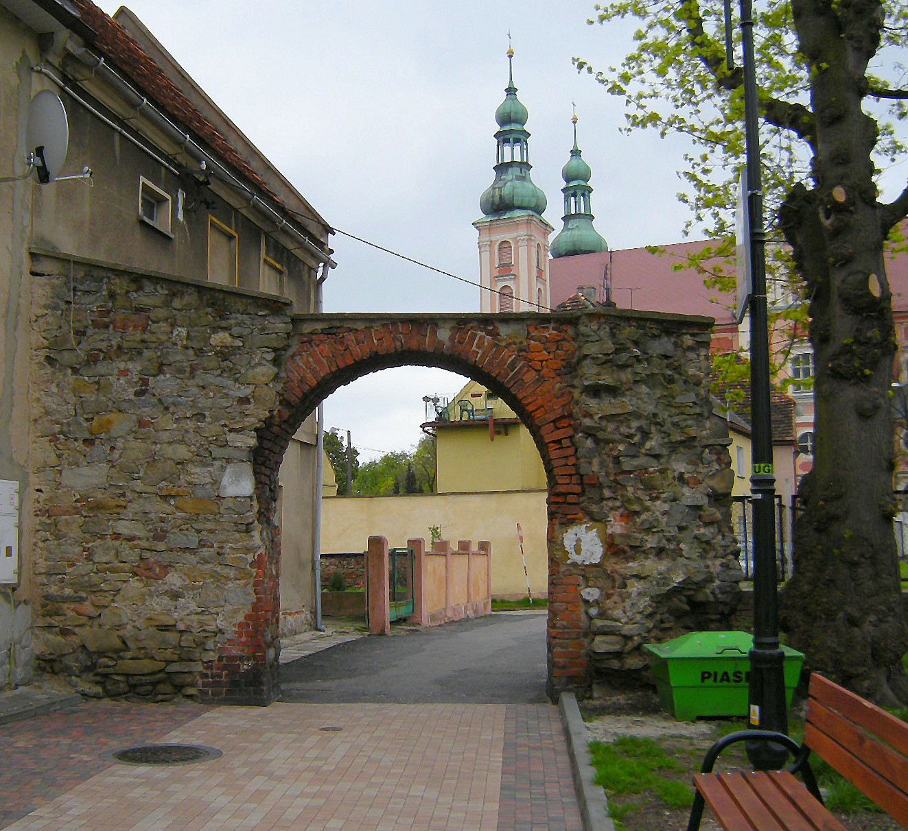 Otmuchów ul. Żeromskiego Fragment murów obronnych